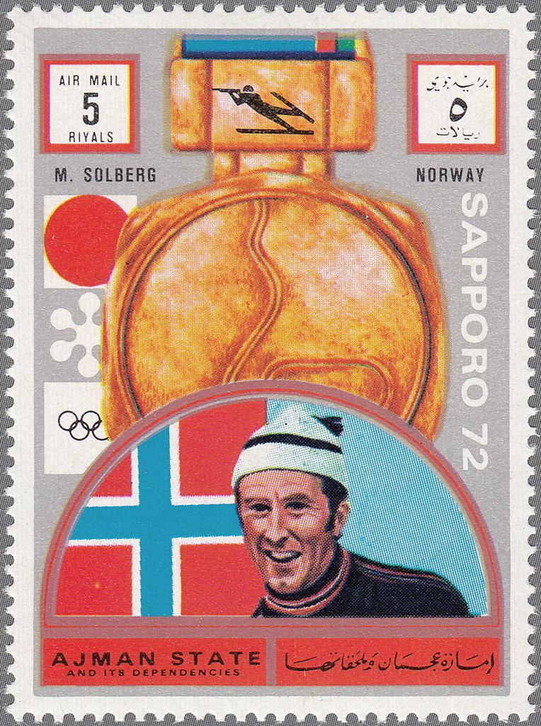 Magnar Solberg